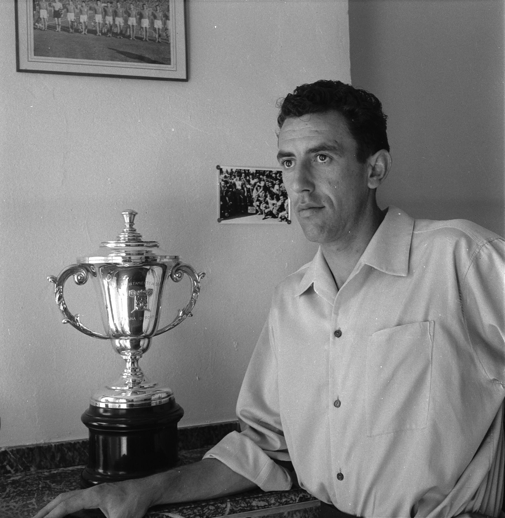 Domicile de Pierre Cahuzac. Août 1959. Vue de Pierre Cahuzac, près de la cheminée, avec une coupe.